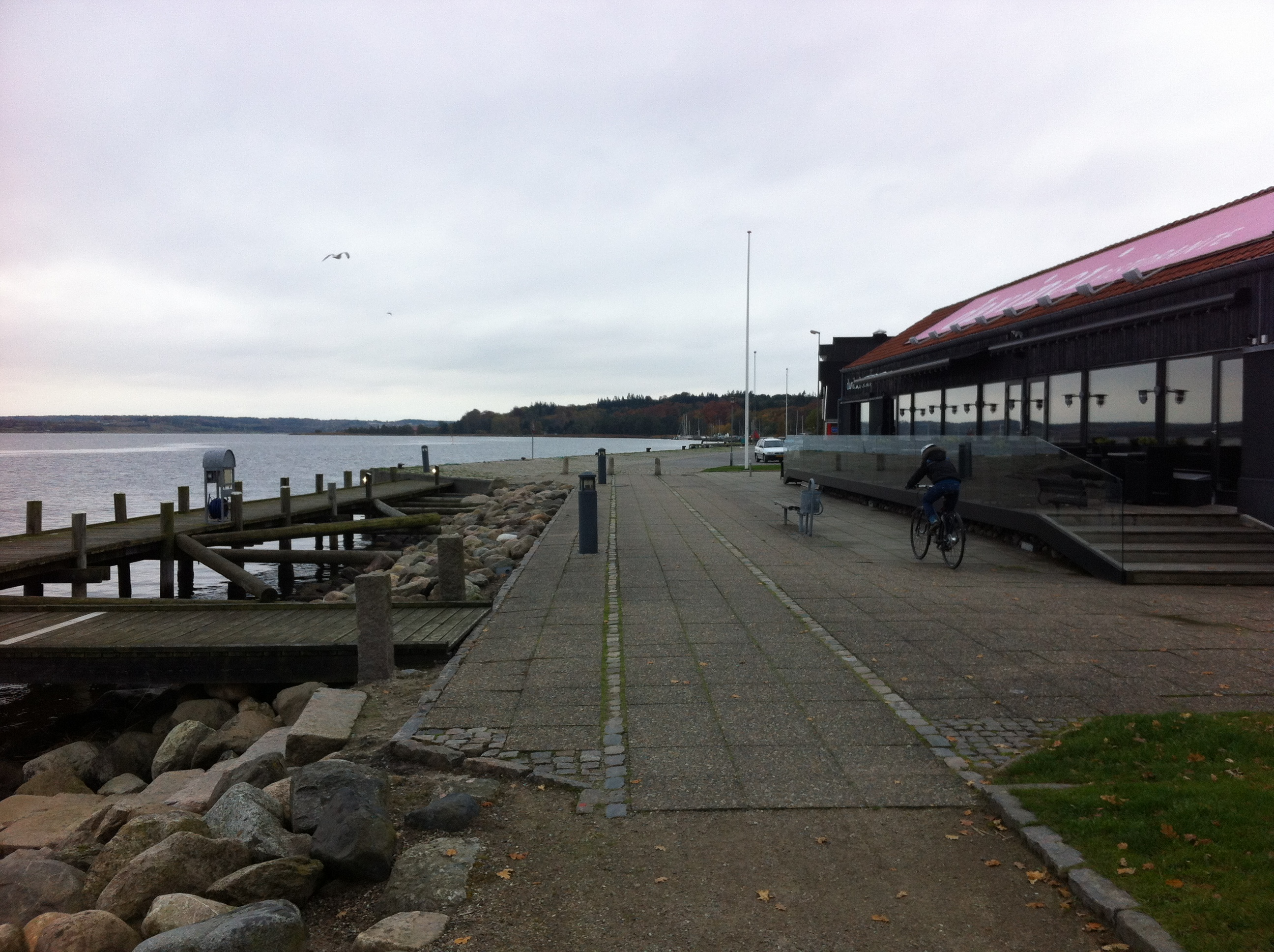 Hadsund Havnebane kørte i midten af billedet.